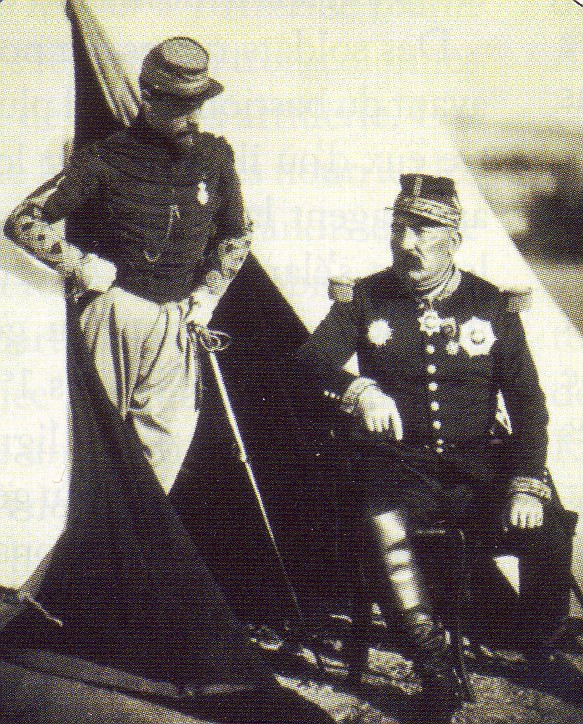 Generale Bosquet comandante del 2 corpo francese con il capitano Dampierre, Crimean War 1855